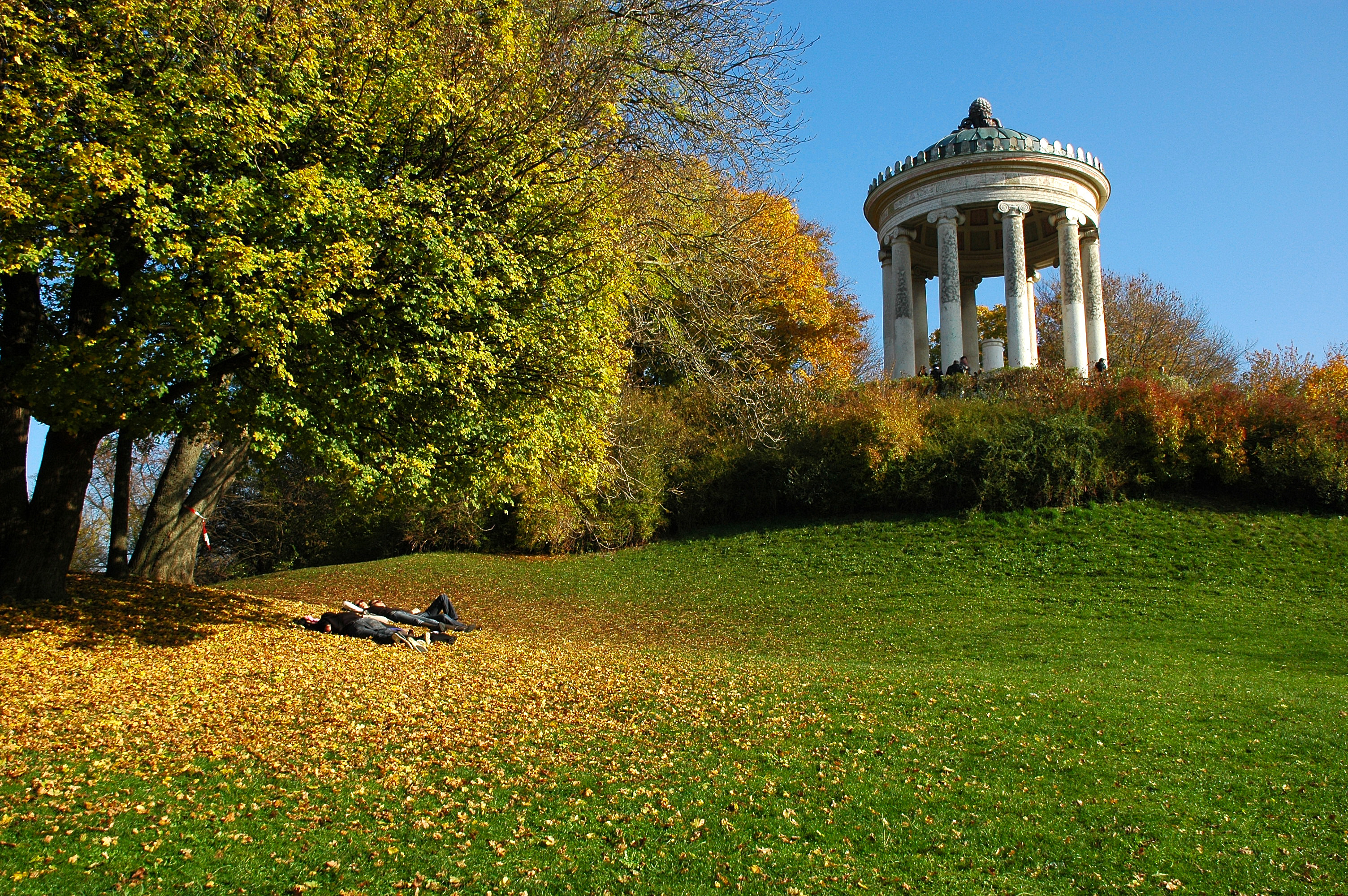 Monopteros im Herbst - Englischer Garten München